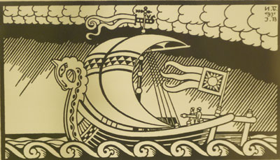 И.Я. Билибин Иллюстрация к сказке Семь симеонов